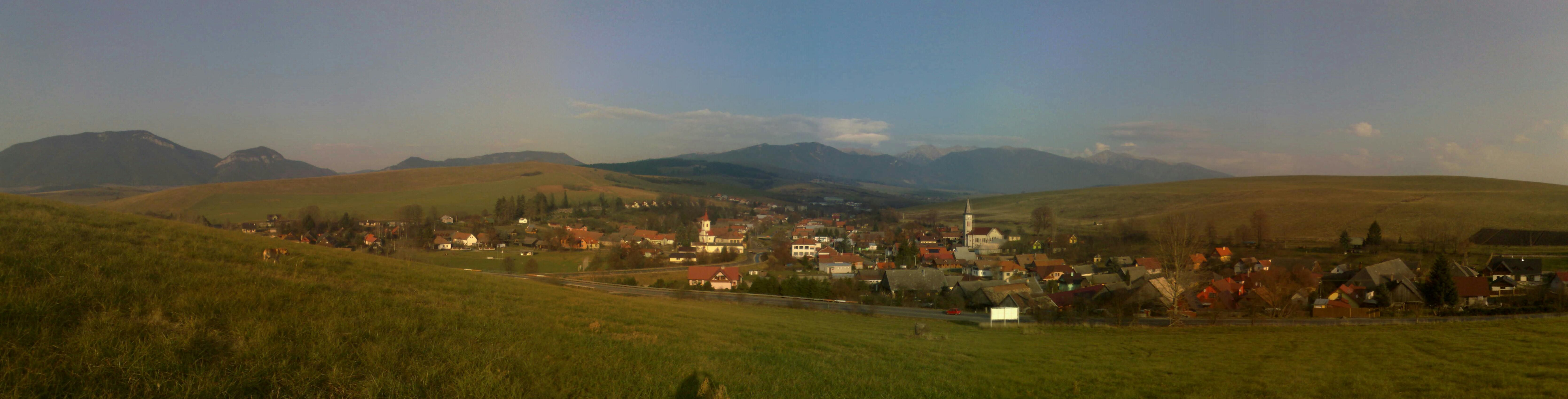 Foceno/съемки 13:35